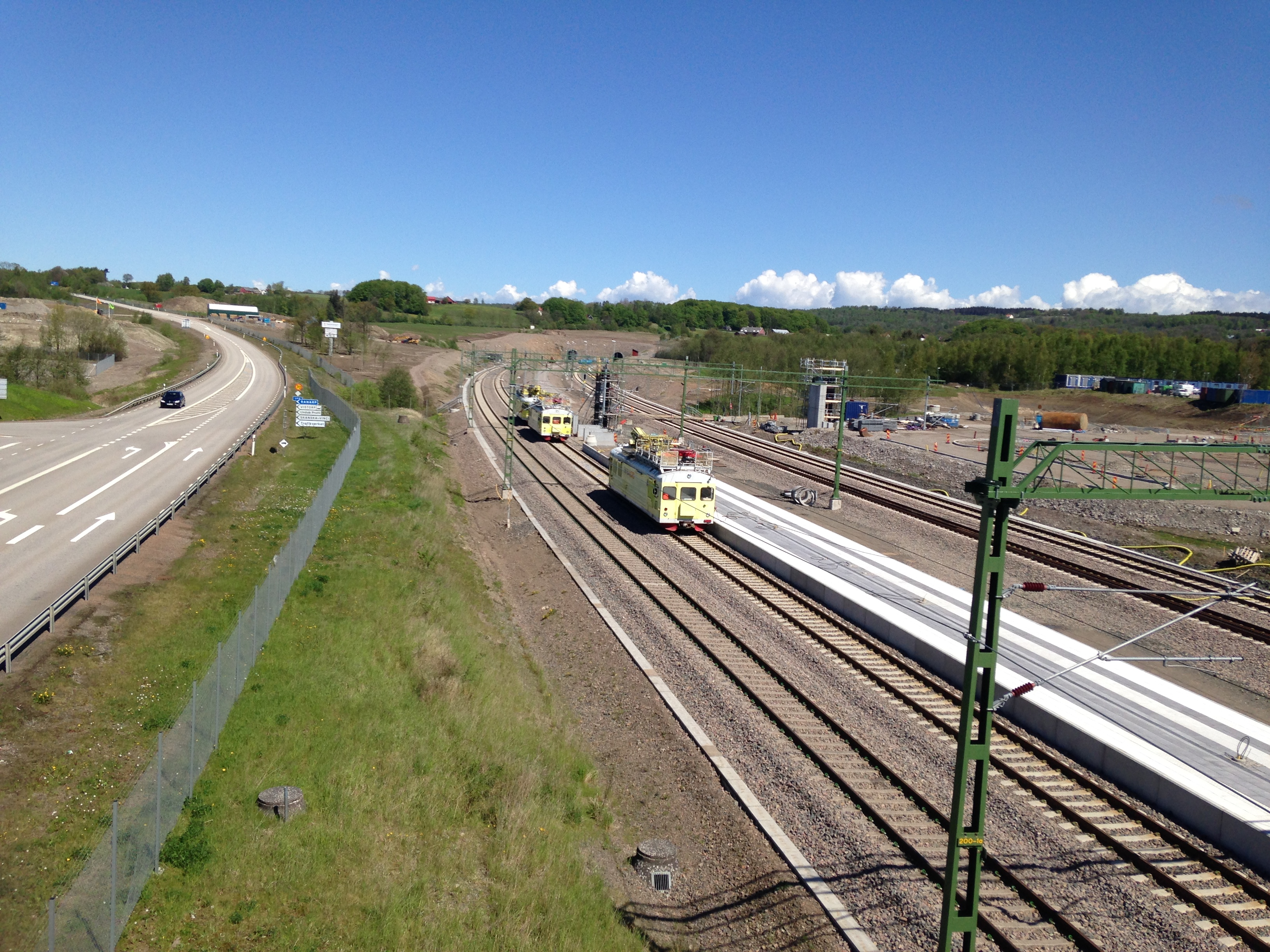 Hallandsåstunnelns södra mynning med Förslövs pågatågsstation.